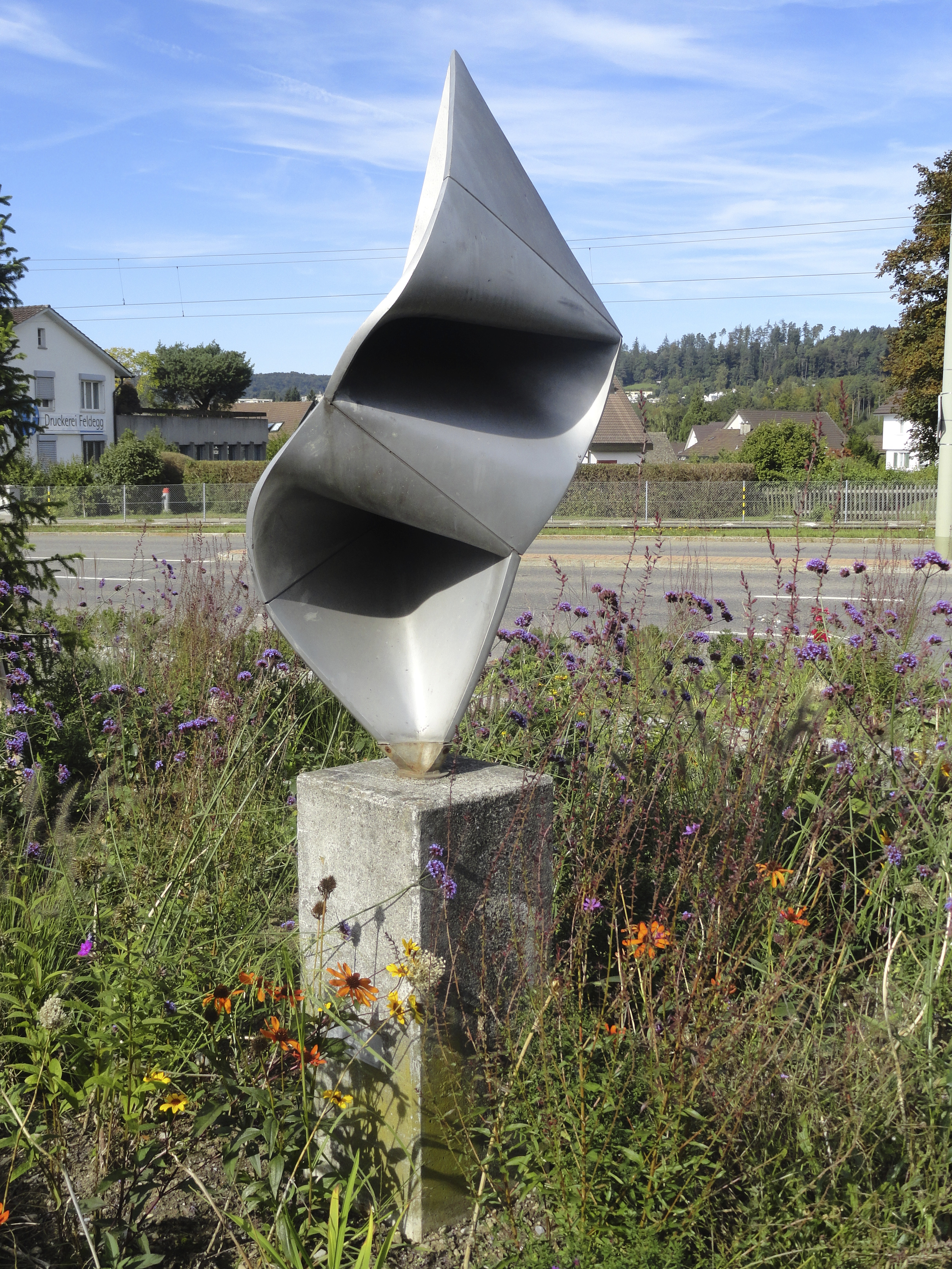 Carlo Vivarelli: "Sechs Quadrate", Bus-Endstation Zollikerberg, CH